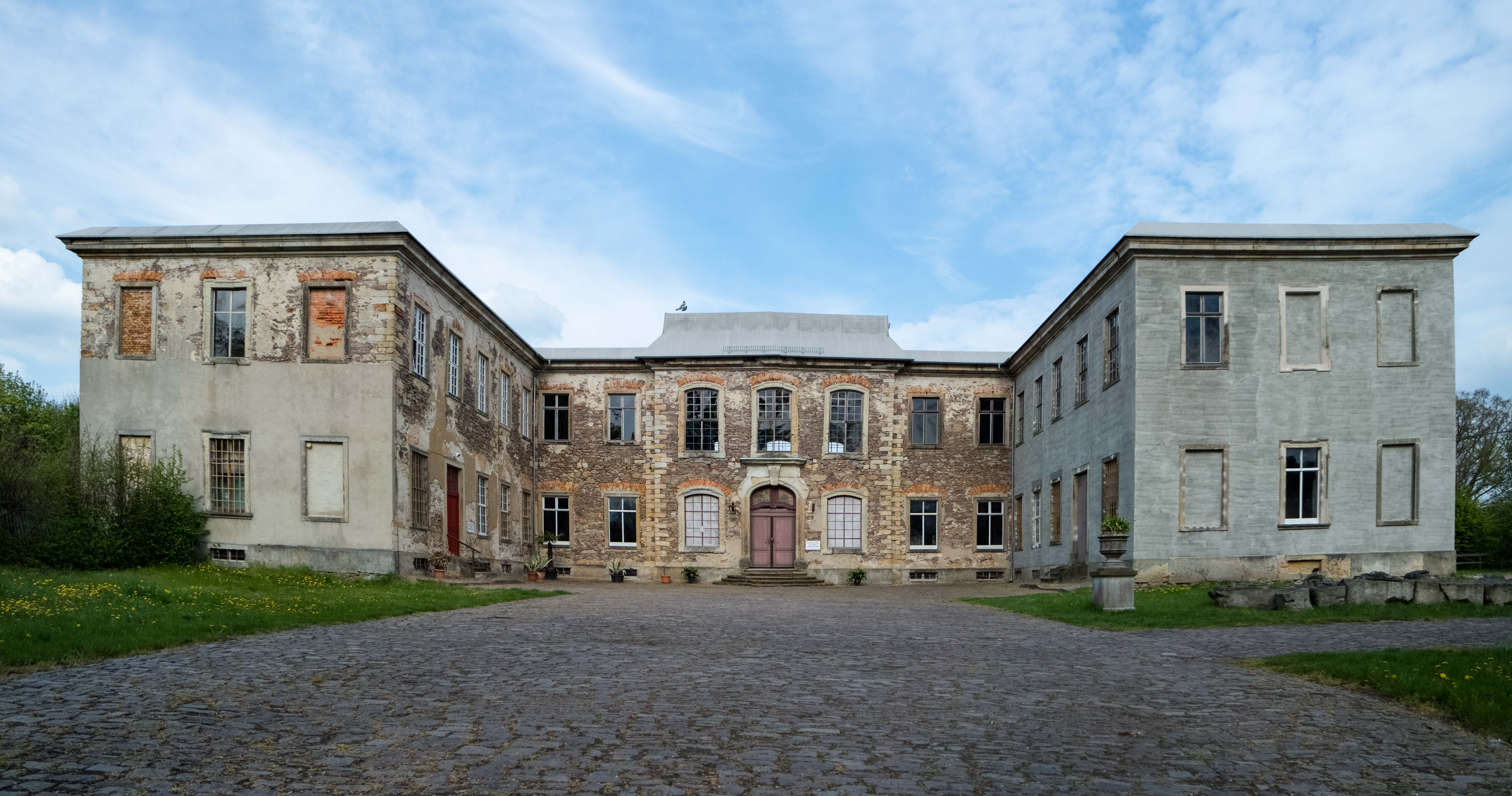 Barockschloss Dahlen